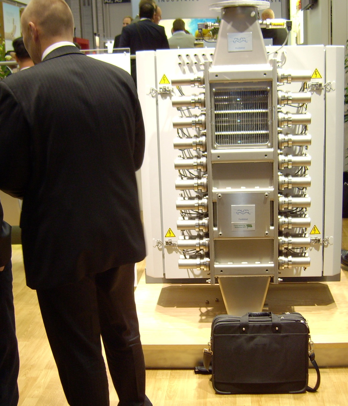 Ballast-Aufbereitungsanlage